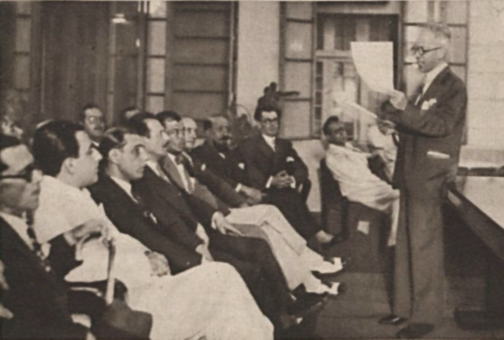 O jornalista brasileiro Herbert Moses, então presidente da Associação Brasileira de Imprensa (ABI), em sessão de prestação contas da entidade, lendo o relatório anual de sua gestão.